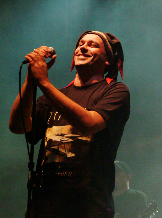 Tomasz Budzyński member of Armia polish rock band